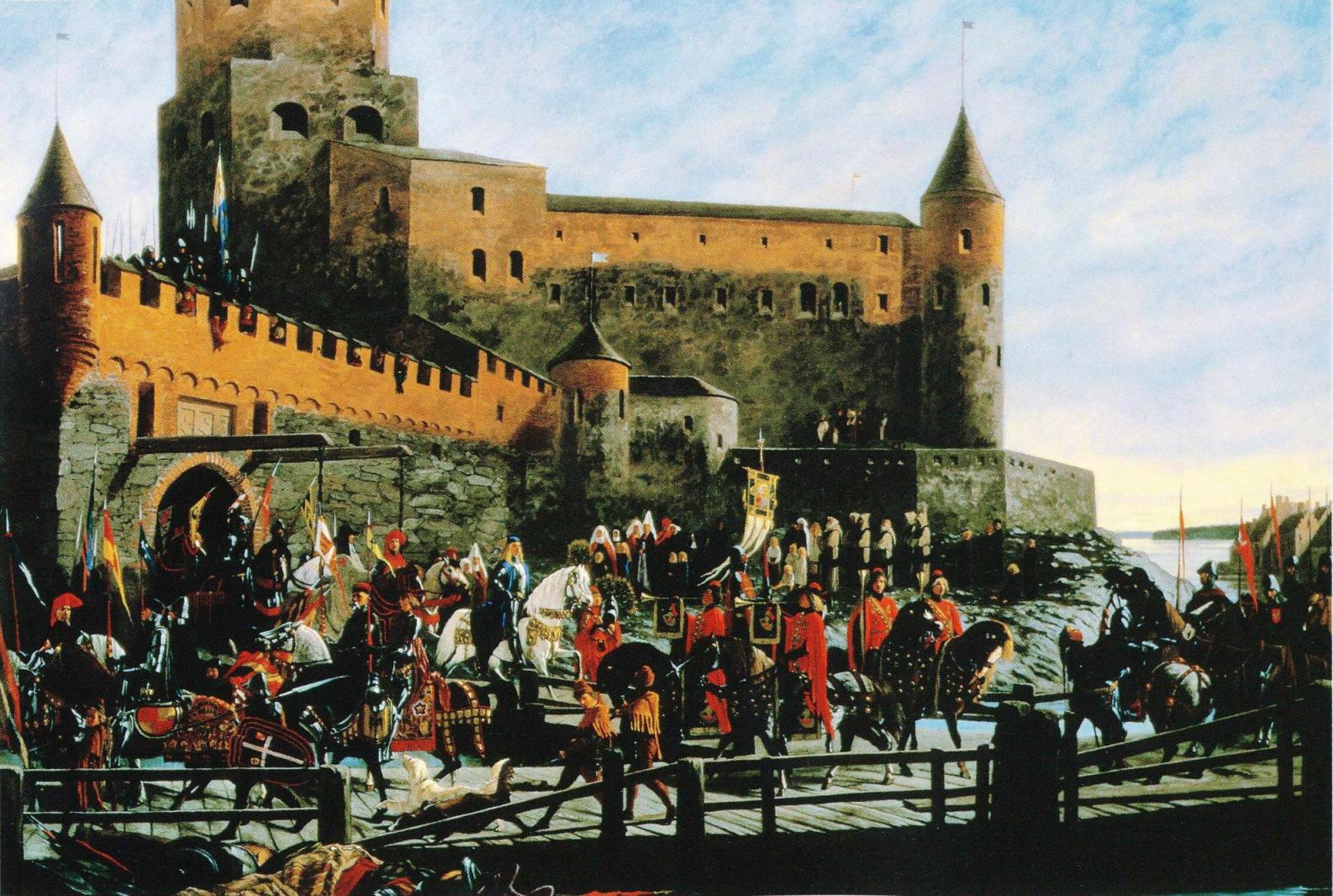 Severin Falkmanin historiamaalaus Kaarle Knuutinpoika Bondesta lähdössä vuonna 1448 Viipurin linnasta Tukholmaan, jossa hänet valittiin Ruotsin kuninkaaksi. Falkman valmisteli maalausta vuosien ajan. Suomen valtion omistama teos on nykyään sijoitettu Helsingin Presidentinlinnan keltaiseen saliin.